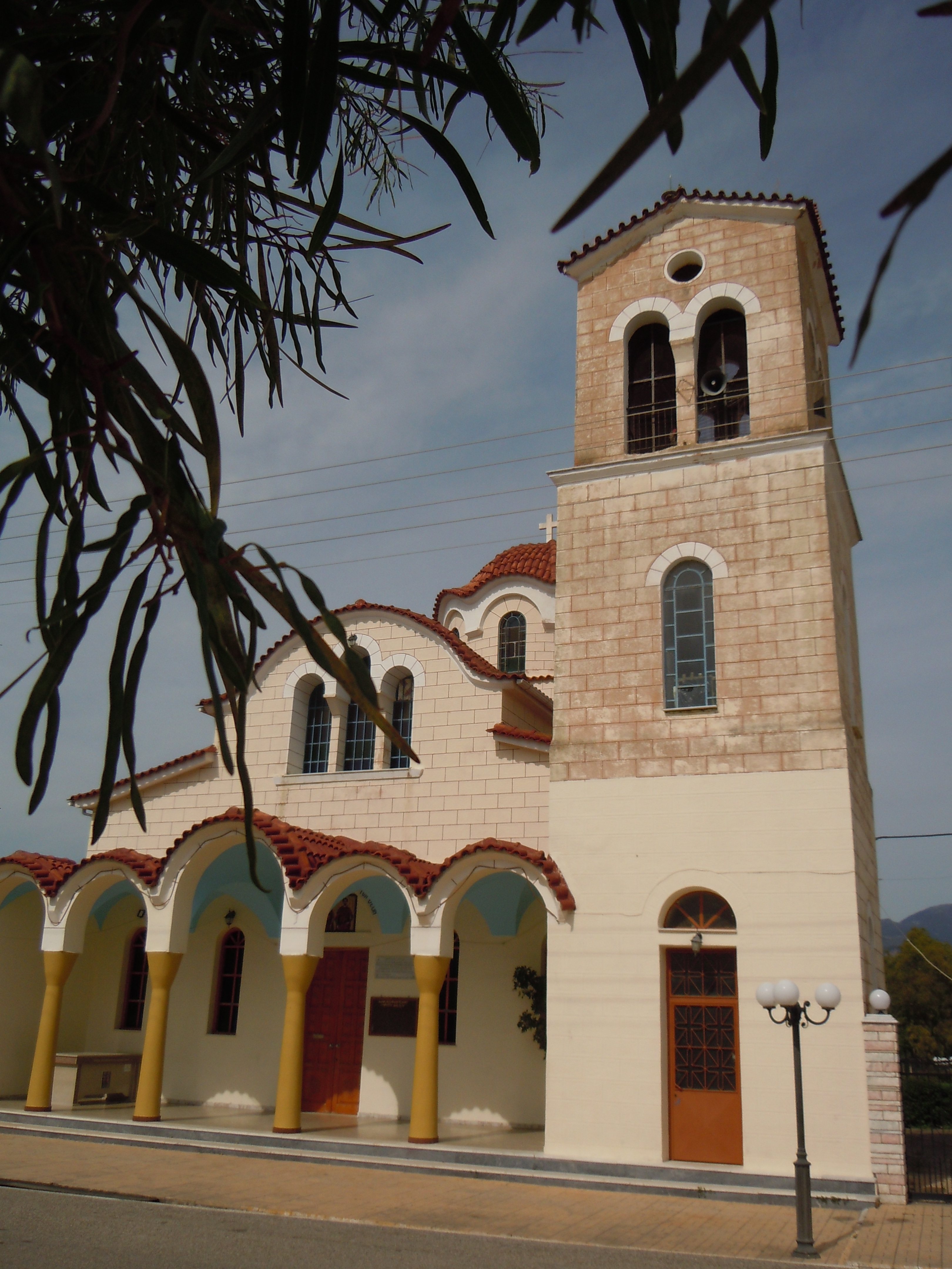 Eglise de Kakovatos